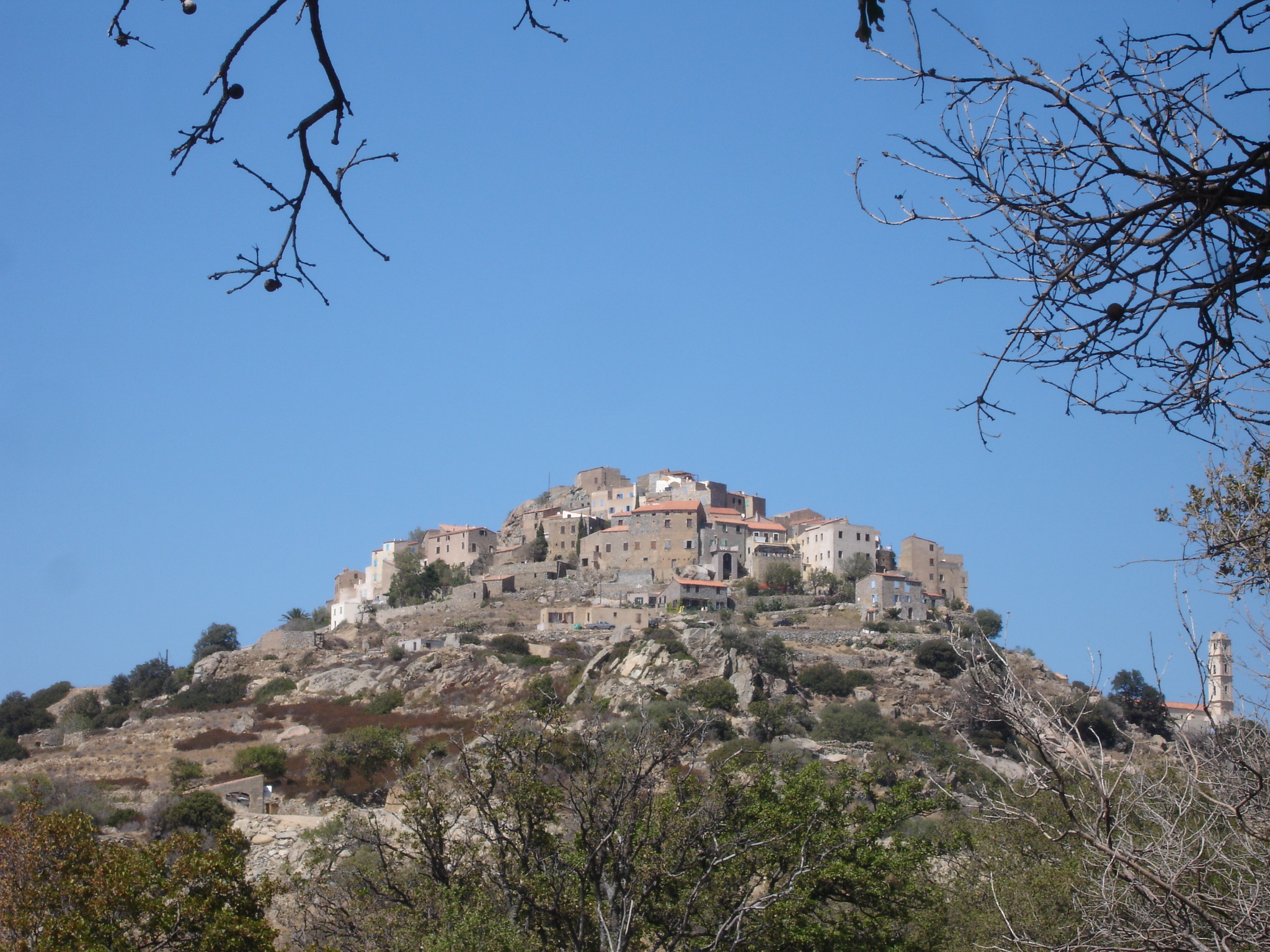 France, Haute-Corse (2B), Sant'Antonino